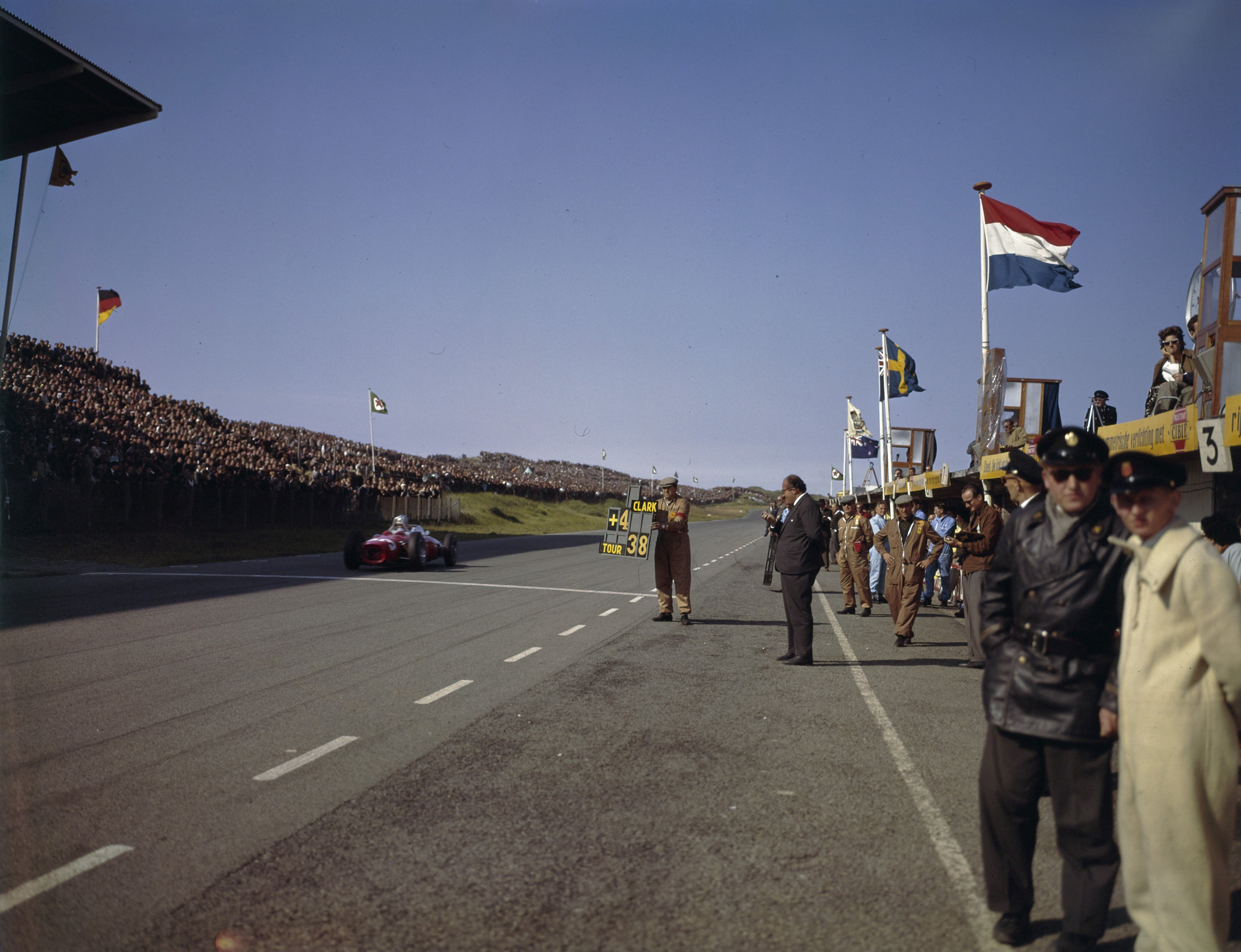 Collectie / Archief : Fotocollectie Anefo Reportage / Serie : [ onbekend ] Beschrijving : Autoraces, Grand Prix Datum : 22 mei 1965 Locatie : Noord-Holland, Zandvoort Trefwoorden : Autoraces Persoonsnaam : Grand Prix Fotograaf : Fotograaf Onbekend / Anefo Auteursrechthebbende : Nationaal Archief Materiaalsoort : Dia (kleur) Nummer archiefinventaris : bekijk toegang 2.24.01.08 Bestanddeelnummer : 254-7298 Reacties Geplaatst door Arjen Sijpkes op 22 juli 2013 - 19:15. Drie mooie kleurenopnamen van de Grand Prix van Zandvoort d.d. 22 mei 1961. En niet op 22 mei 1965.